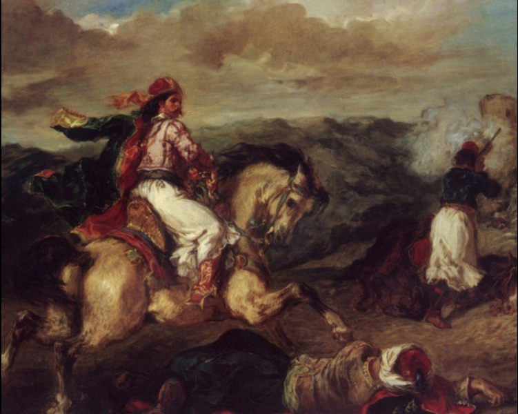 'Εργο του γάλλου ζωγράφου Delacroix